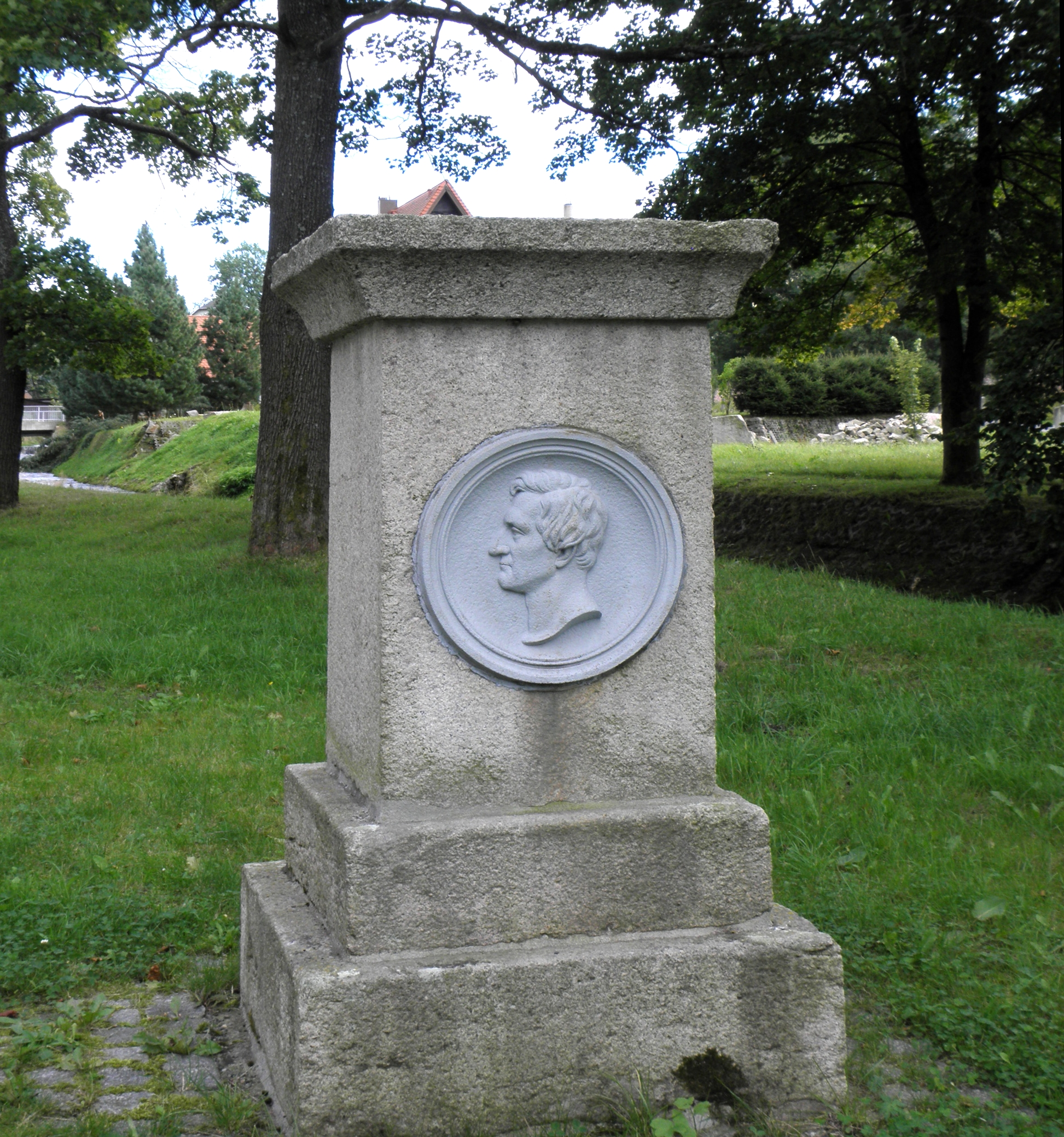 Carlsfeld, Prinzendenkmal neben Trinitatiskirche